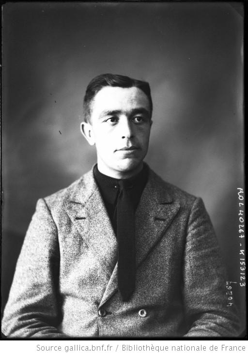 Paul Deman : portrait du coureur cycliste avant le départ